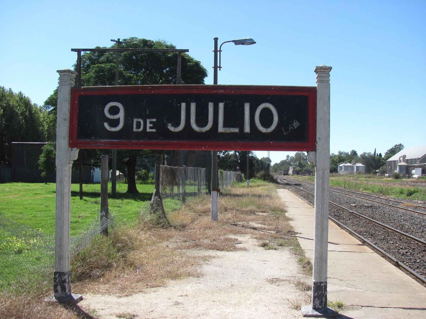 Estación 9 de Julio, Buenos Aires.